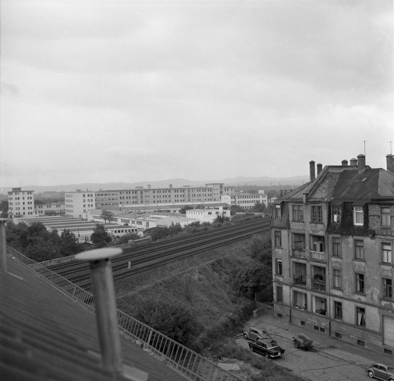 Stadtaufnahmen Frankfurt/Main-Gallus